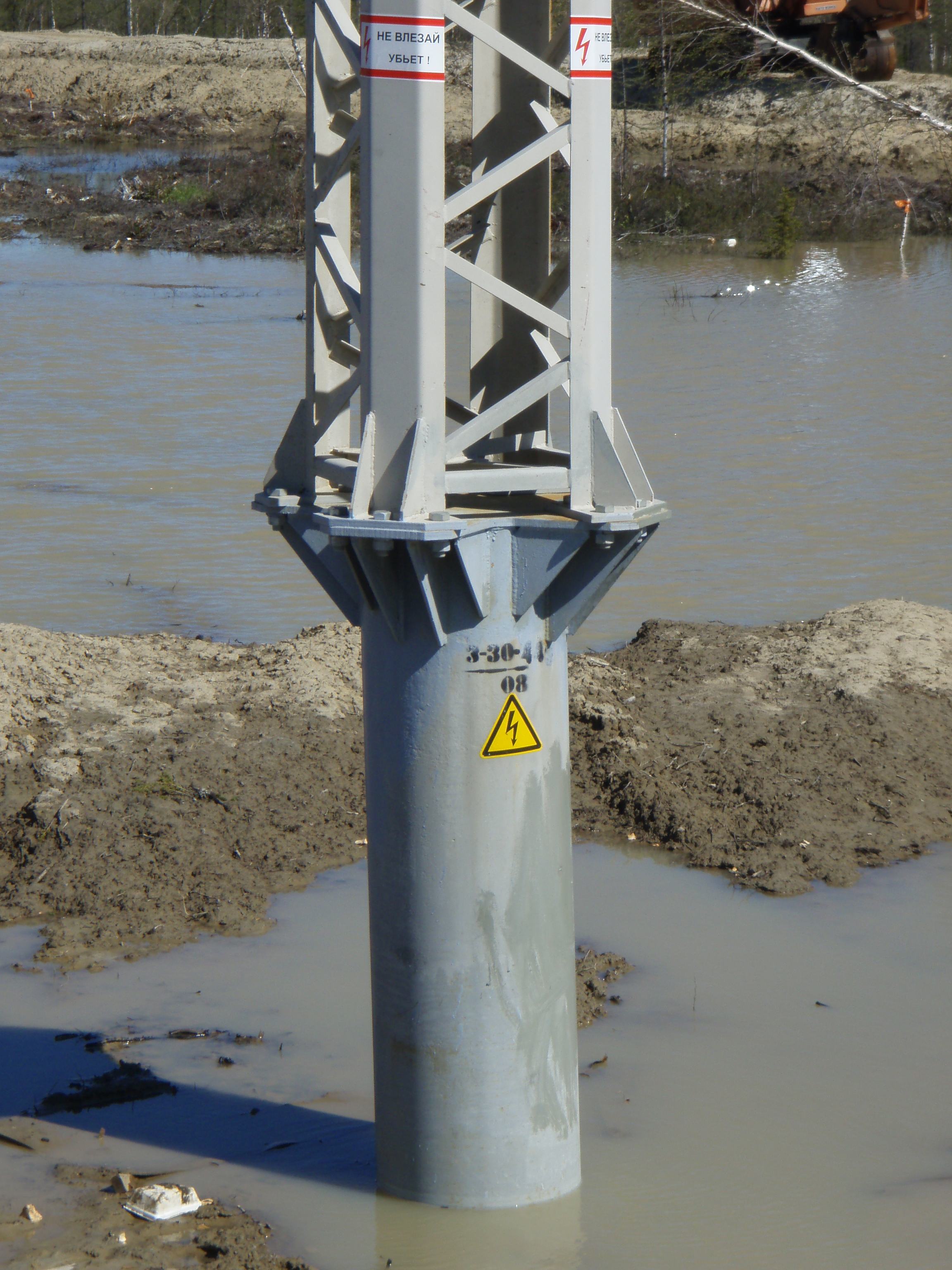 F530. Узкобазовая опора (ГК ЭЛСИ) установленная в сложном гунте